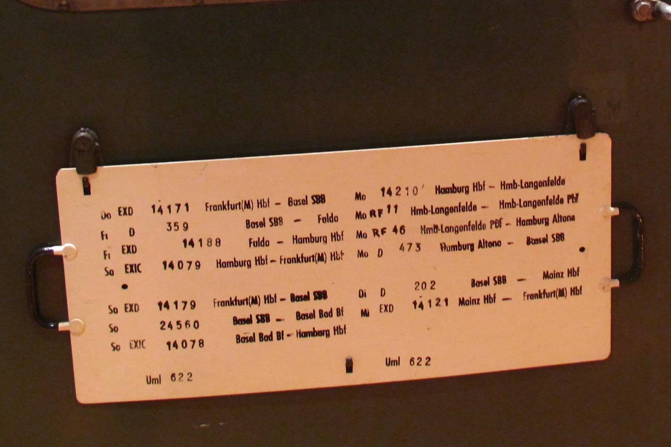 Zuglaufschild eines Bahnpostwagens, Zustand zwischen 1985 und 1997, Museum für Kommunikation (früheres Bundespostmuseum) in Frankfurt am Main. Der Umlauf dieses Wagens begann donnerstags mit einem Lauf im Postzug ExD-Zug 14171 von Frankfurt bis Basel (links oben), es folgte freitags ein Lauf im Regelzug D 359 von Basel bis Fulda und so weiter. Man erkennt, dass der Wagen samstags und sonntags auch in ExIC-Zügen (umgangssprachlich Post-Intercity genannt) mitgeführt wurde. Nach einer Woche war der Wagen dann wieder am Ausgangspunkt seines Umlaufs.